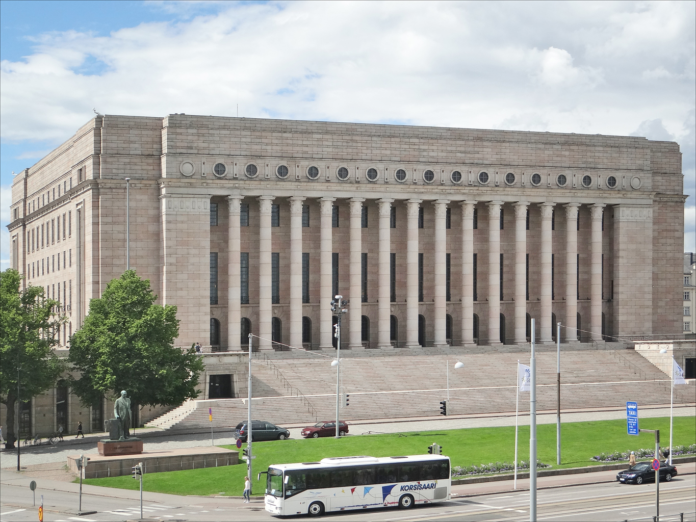 Le Parlement (Eduskuntatalo) ou palais de la Diète nationale a été conçu par l'architecte Johan Sigfrid Sirén (27 mai 1889, Ylihärmä - 5 mars 1961, Helsinki) et inauguré en 1931. L'Eduskuntatalo est dessiné selon le style classique des années 1920. L'extérieur est construit à partir du granit de Kalvola, aux teintes rouges. La façade est décorée de quatorze colonnes dotées de motifs corinthiens. À l'intérieur, le bâtiment compte cinq étages tous différents les uns des autres. Ils sont connectés par des escaliers de marbre blanc et des ascenseurs. Extrait de l'Article de Wikipedia